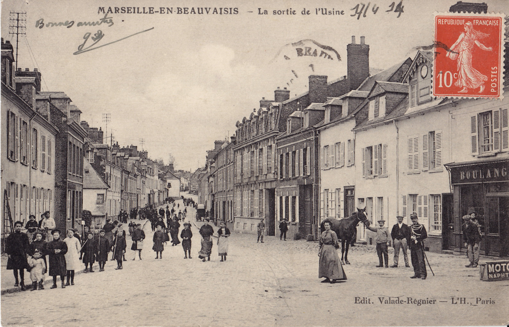 Carte postale ancienne éditée par Valade-Régnier et l'H à Paris : MARSEILLE-EN-BEAUVAISIS - La sortie de l'Usine